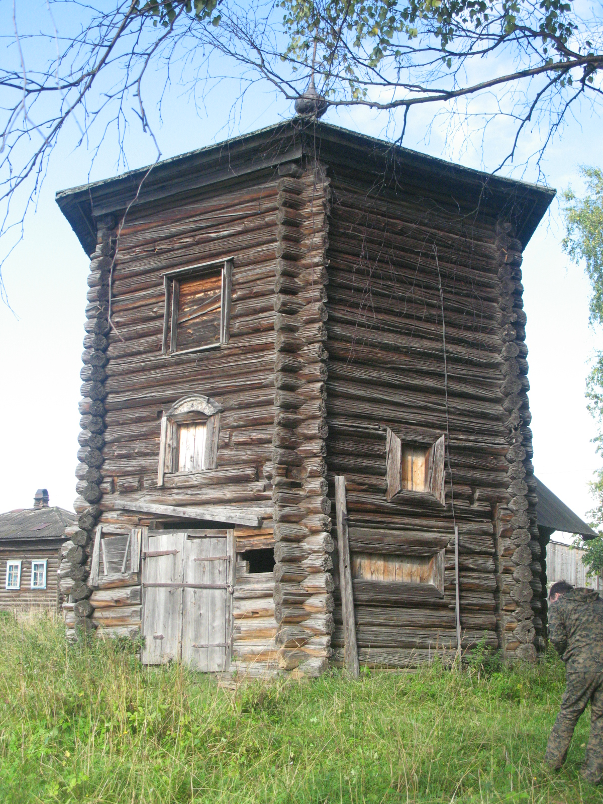 Богоявленская церковь XVII в. (недействующая)